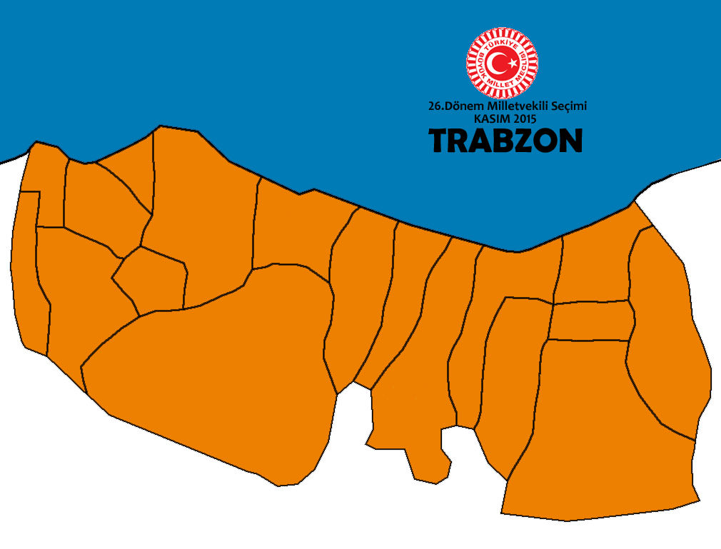 Kasım 2015 Seçimleri